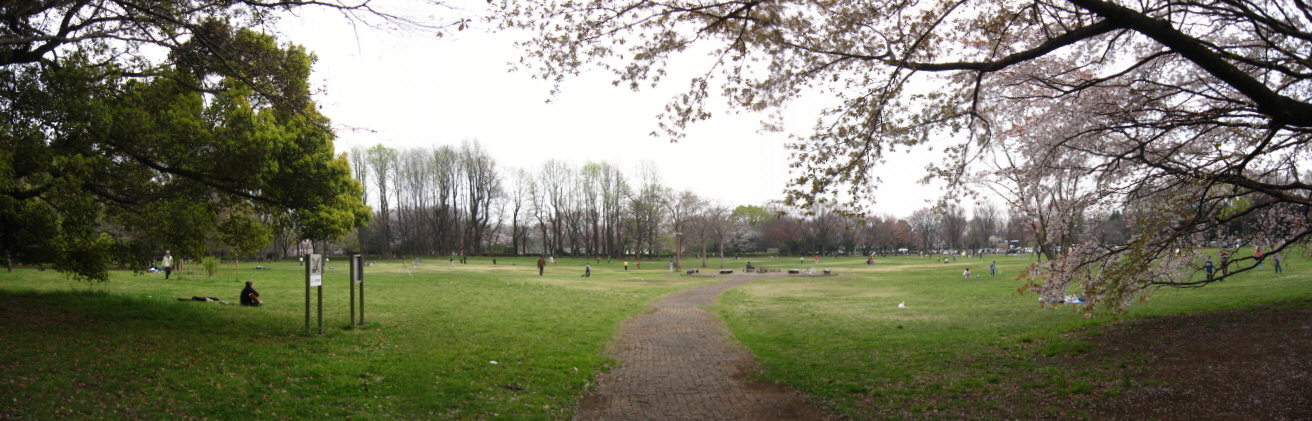 Koganei-Park-Tokyo-Japan